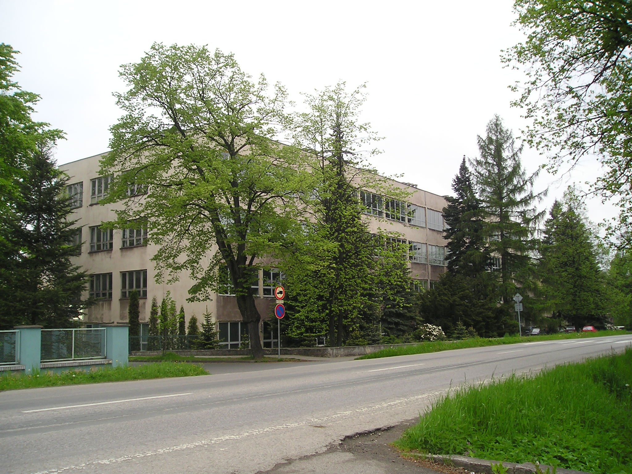 Czech Gymnasium in Český Těšín